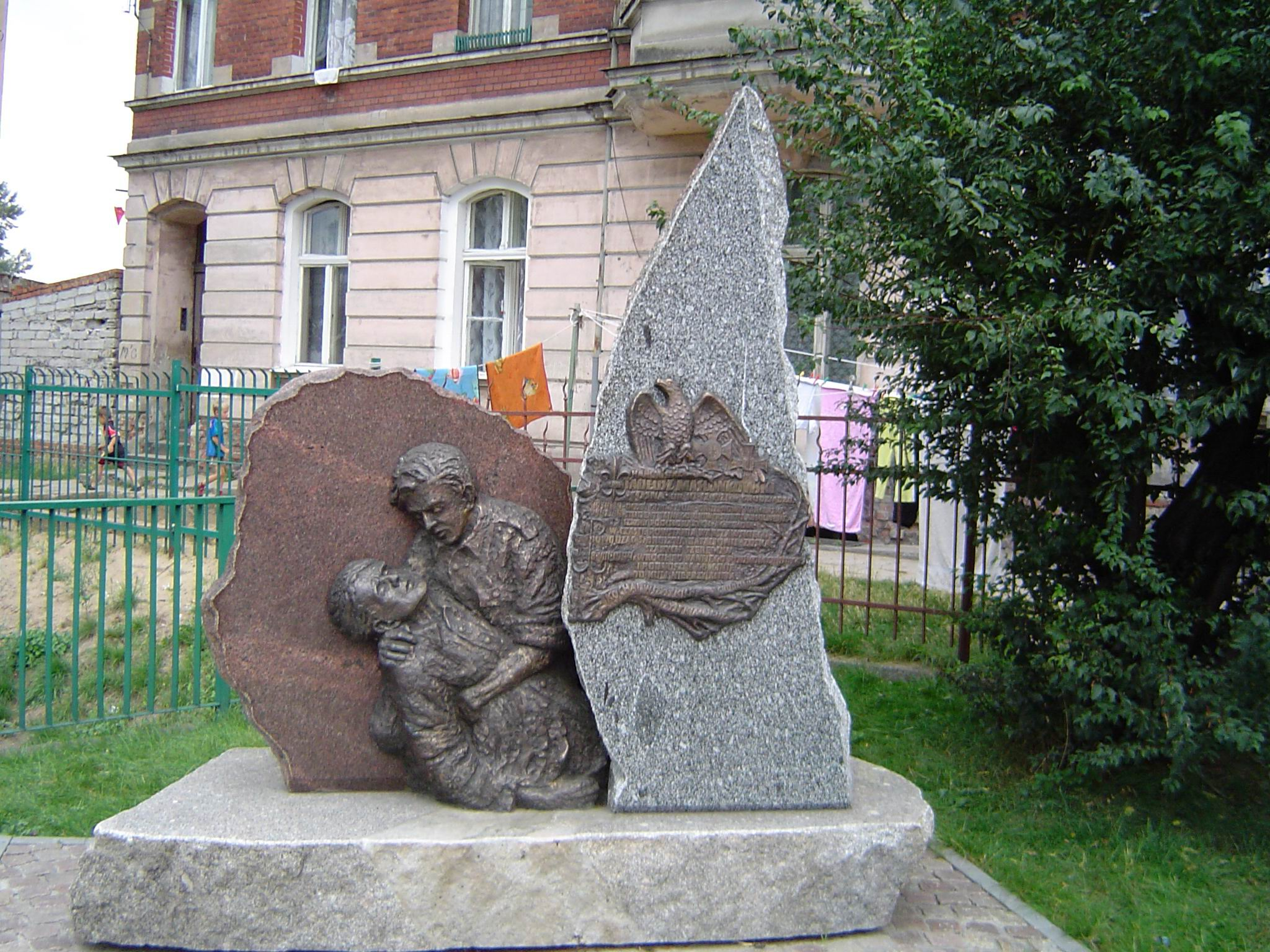 Pomnik T. Maślonkowskiego w Grudziądzu